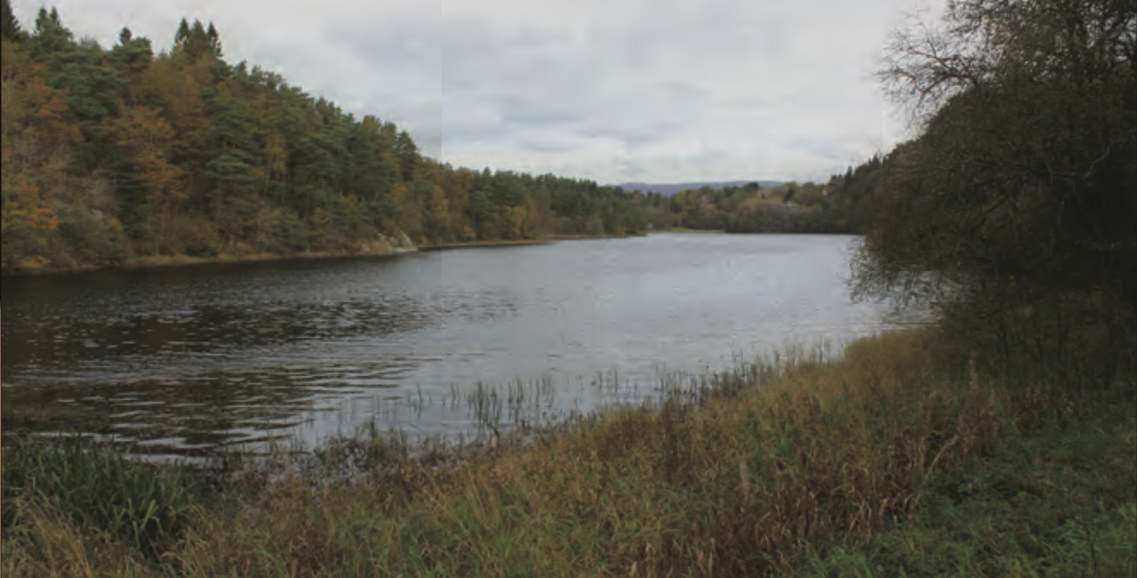 Grimseidvassdraget (2010)